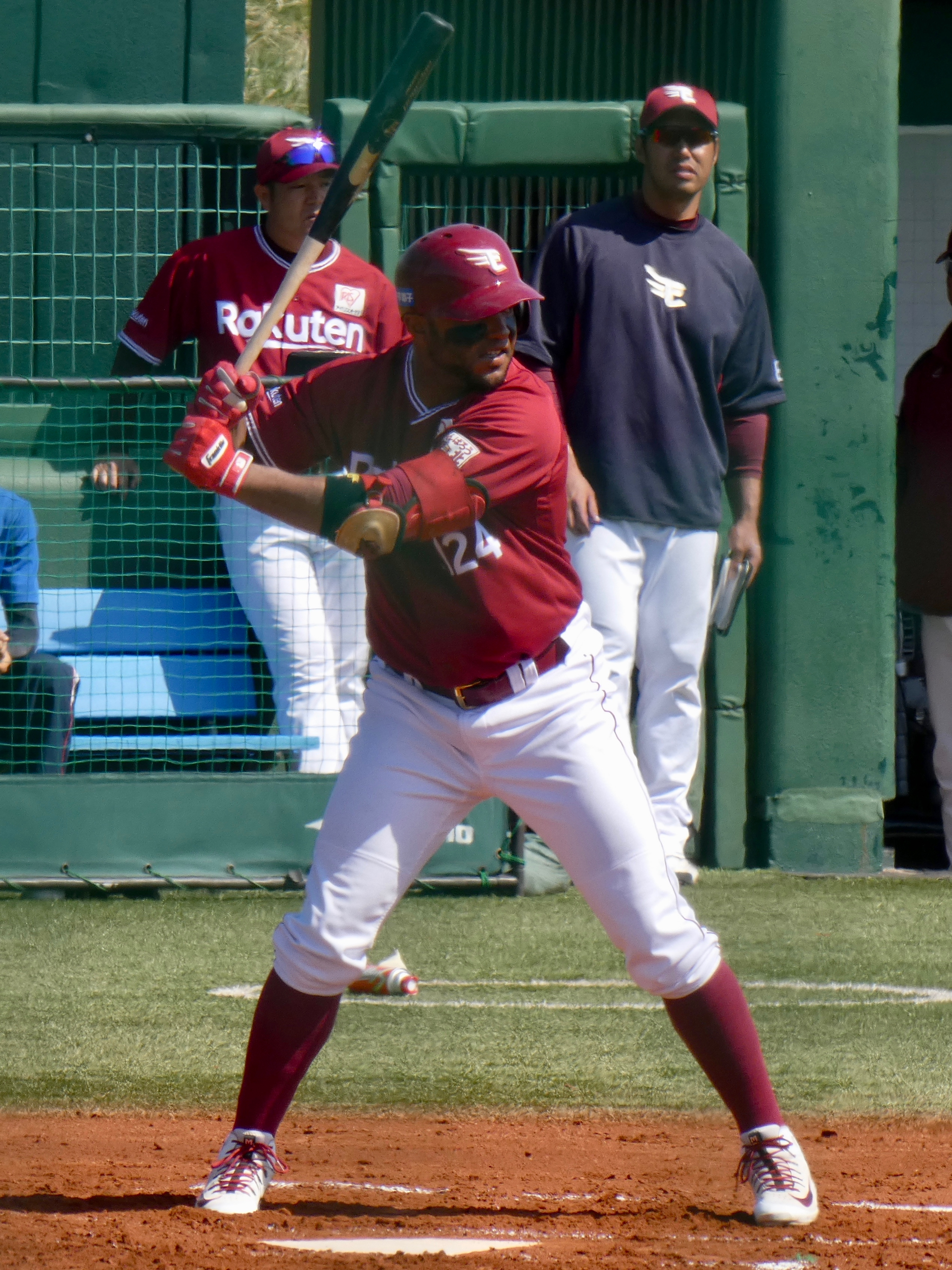 ヤクルト戸田球場にて